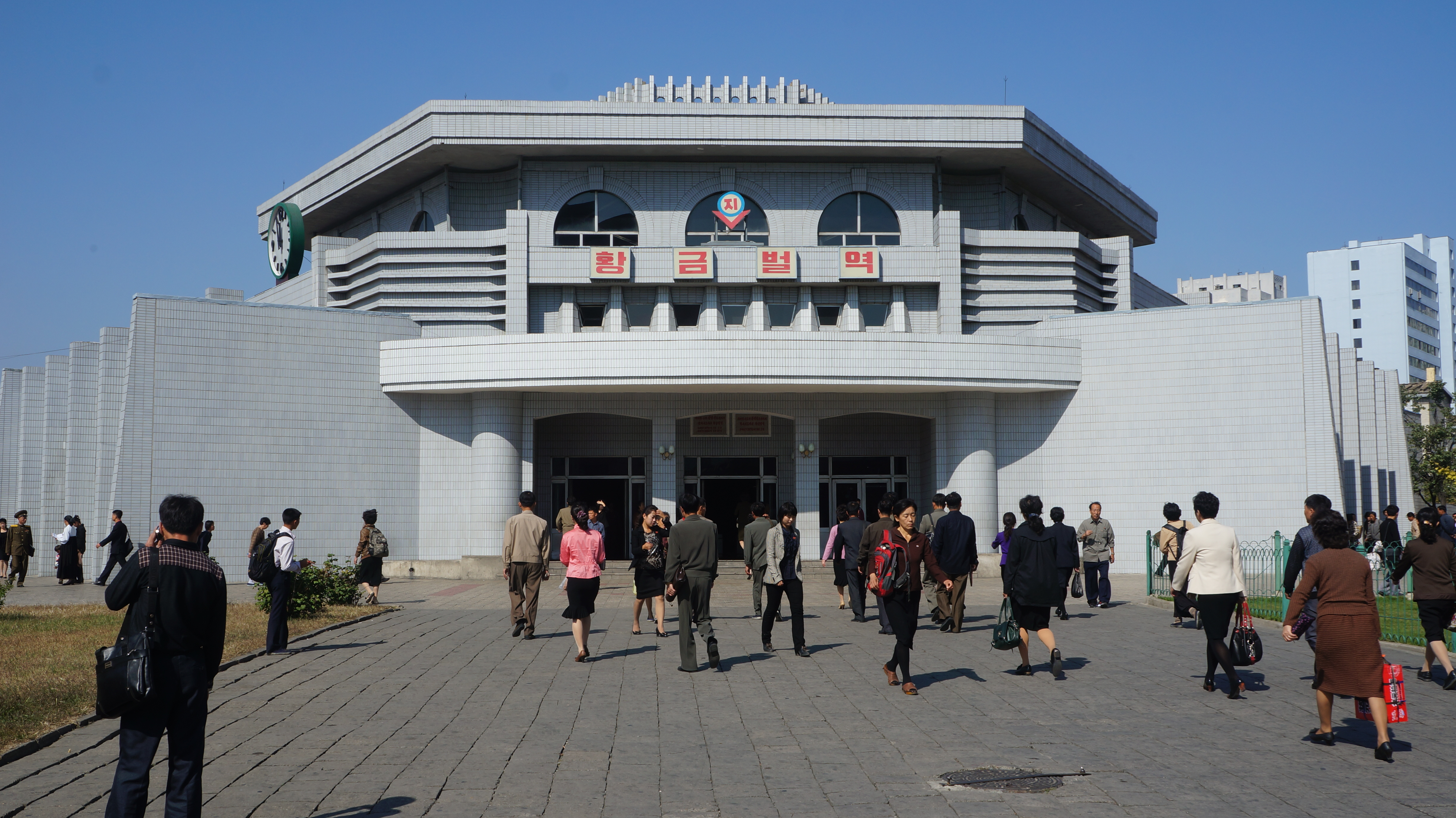 Pyongyang Metro Tour